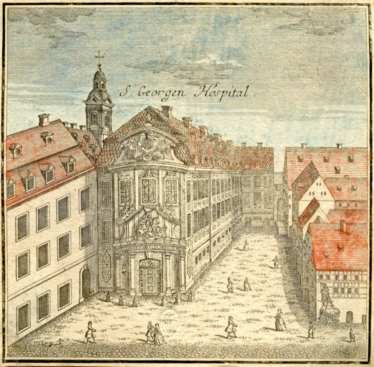 Das Georgenhaus in Leipzig 1749, vom Brühl aus gesehen, rechts die Heuwaage